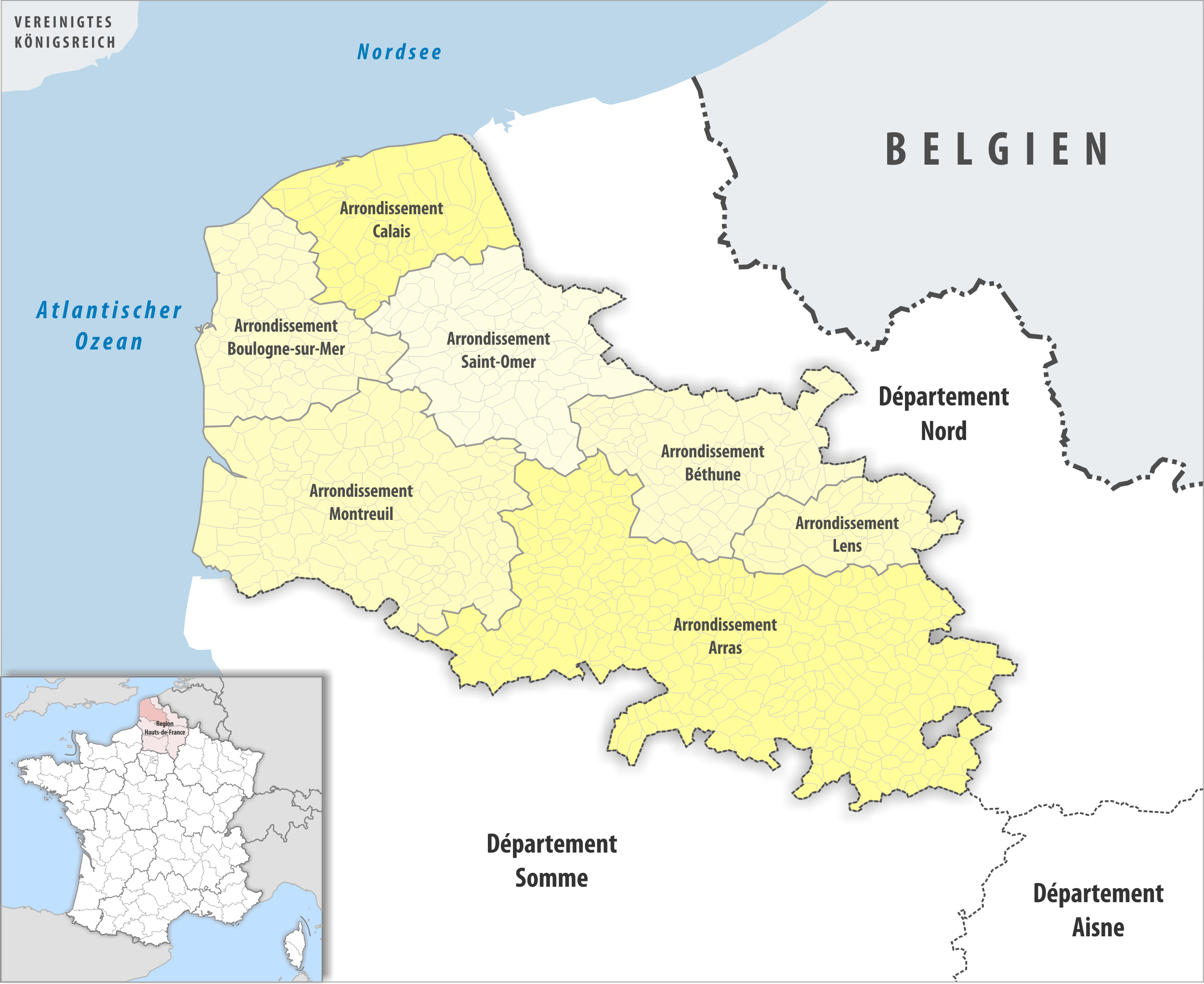 Gemeinden und Arrondissemente im Departement Pas-de-Calais